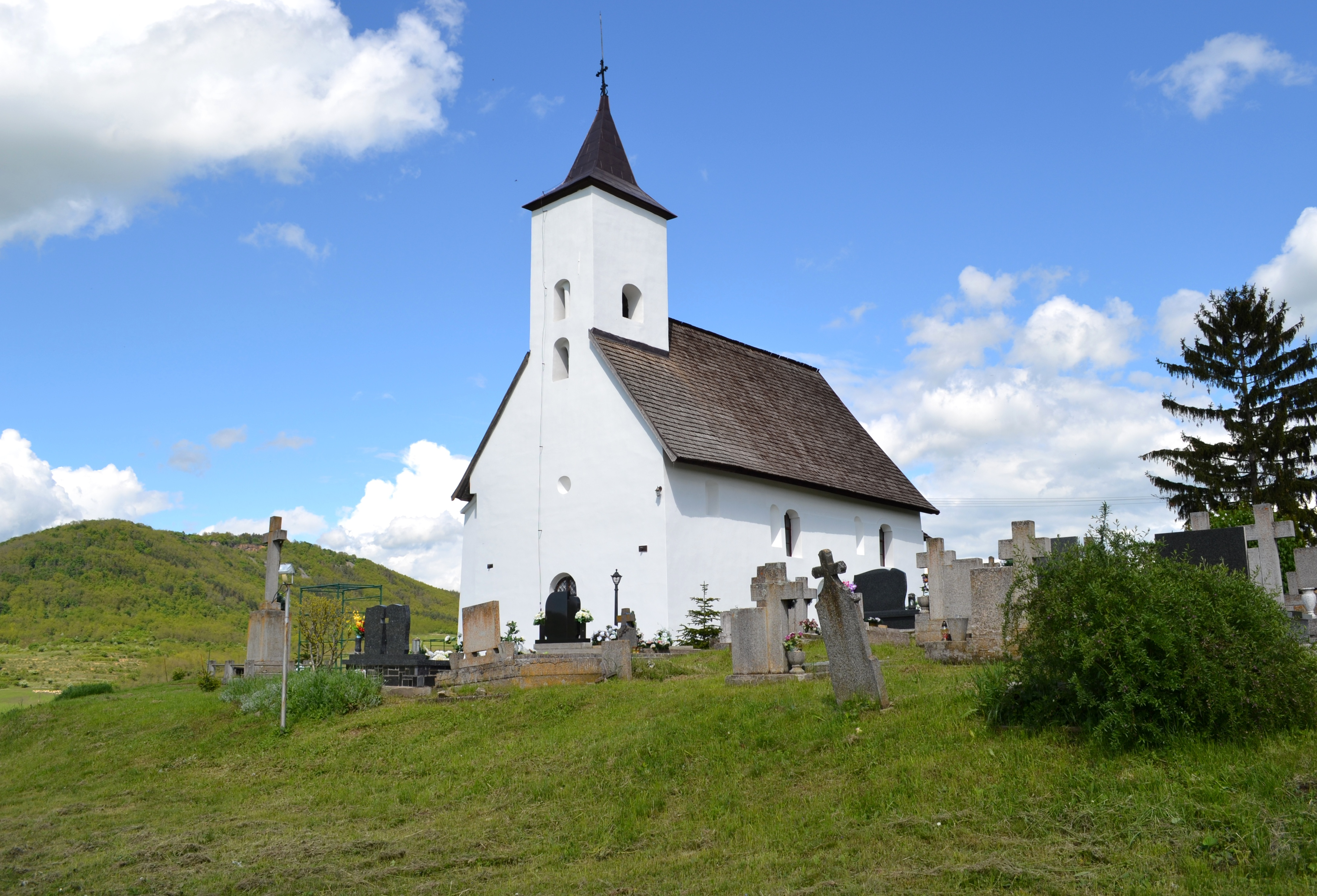 Rímskokatolícky kostol sv. Abdona a Senena v Gemerskom Jablonci je románska stavba z prvej polovice 13. storočia (r. 1220?)